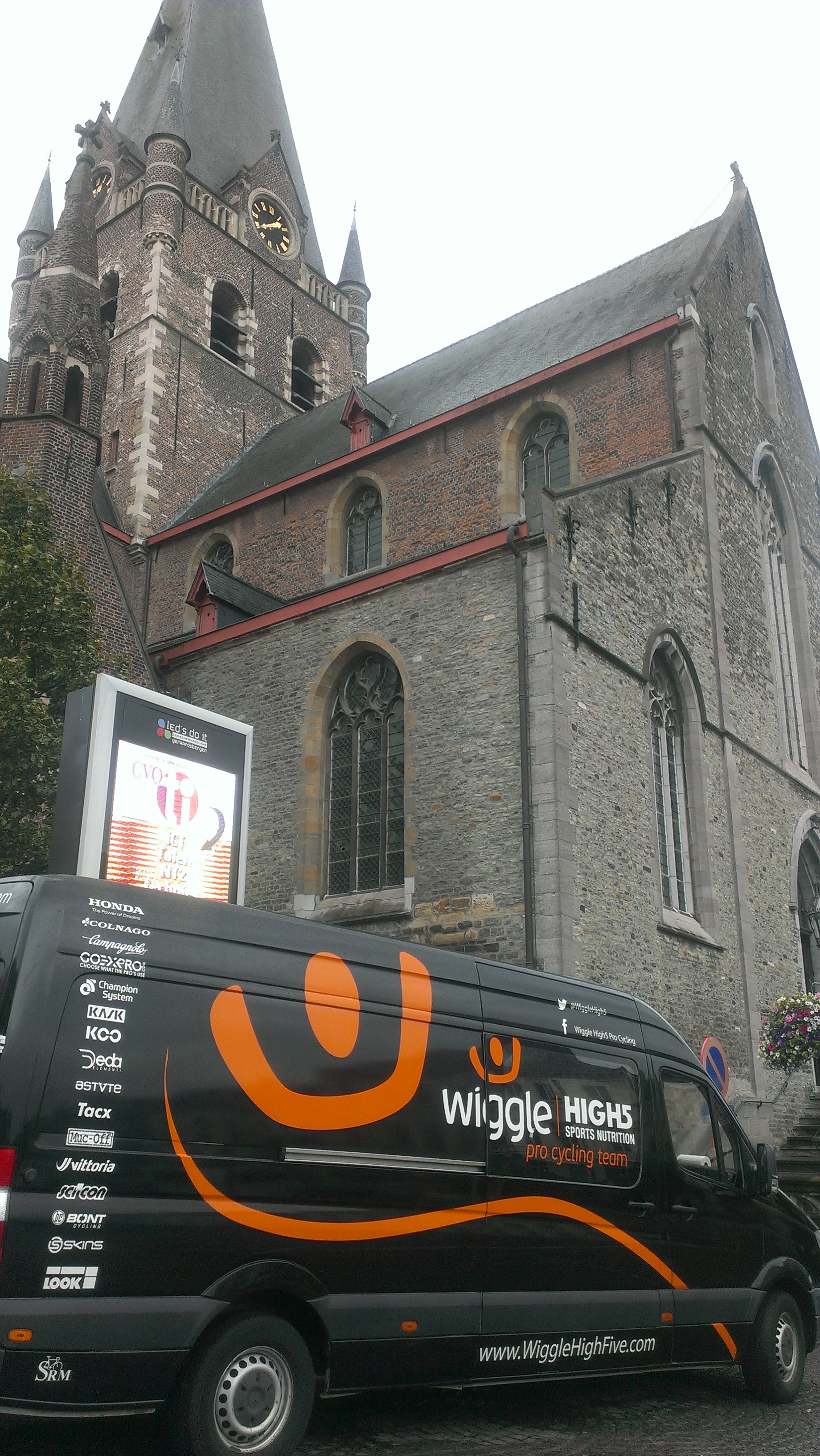 Start van de 3e en laatste etappe van de Lotto Belgium Tour 2017 in Geraardsbergen.